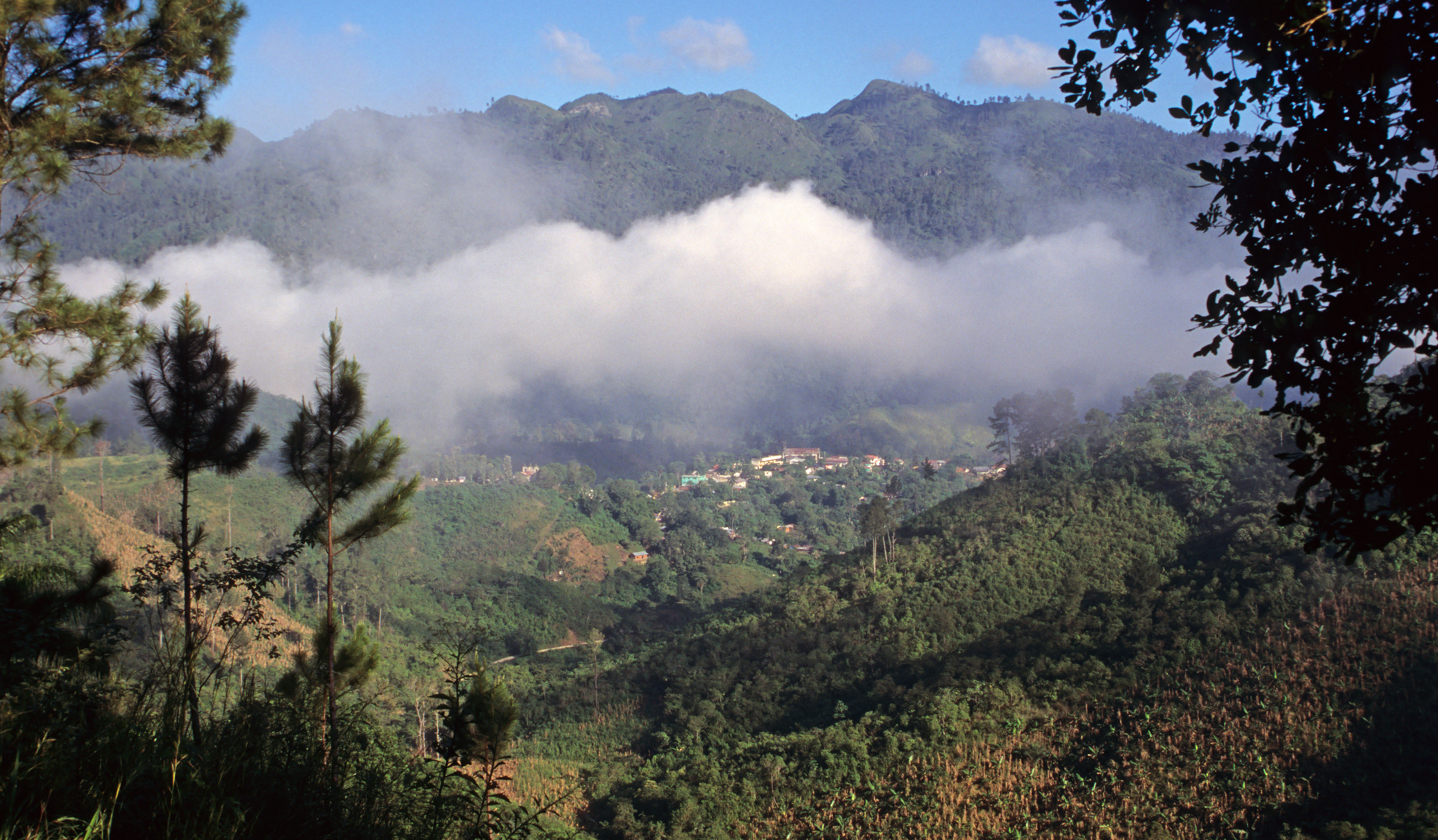 View of Lanquín, Guatemala